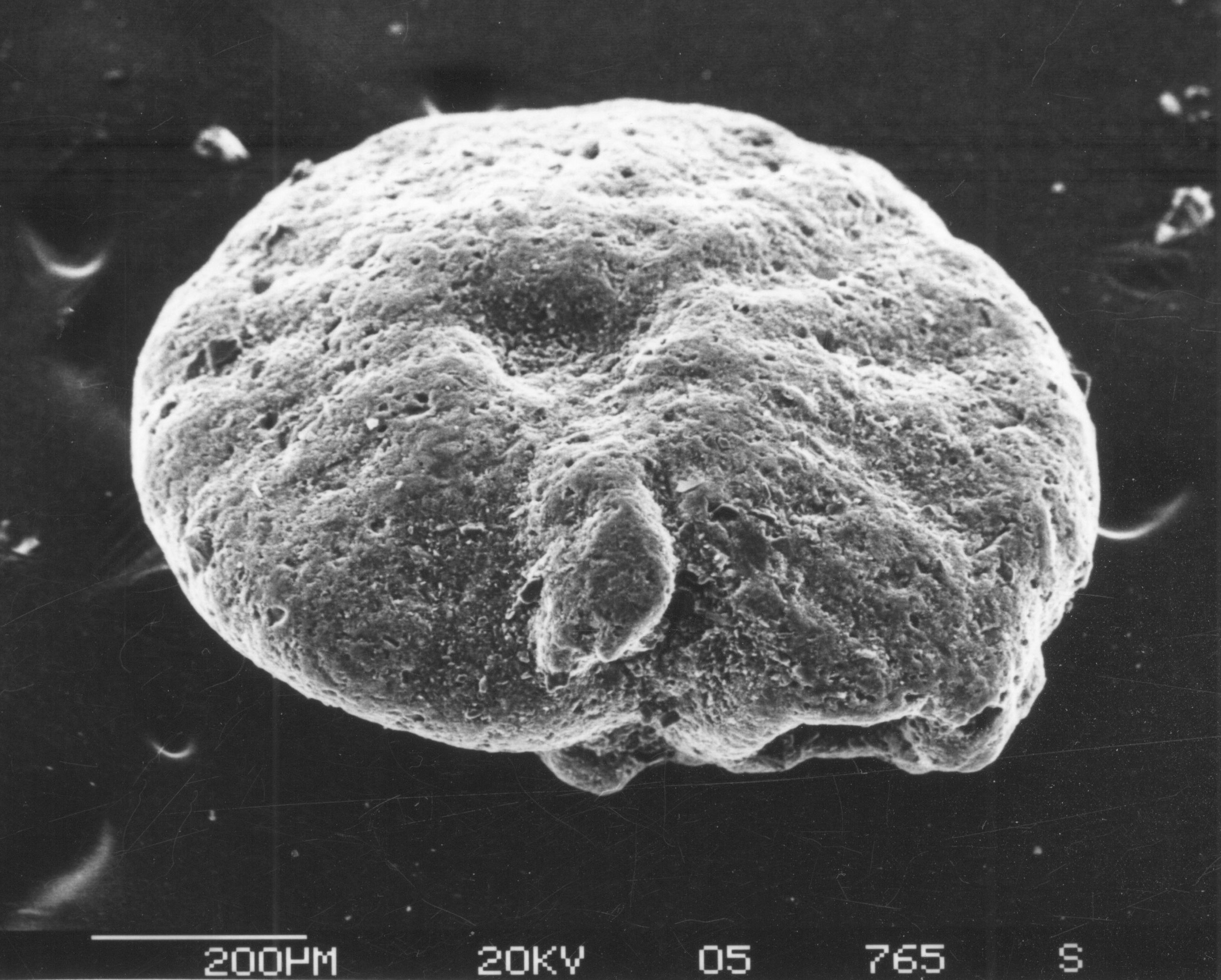 Foraminifera Cyclammina pusilla